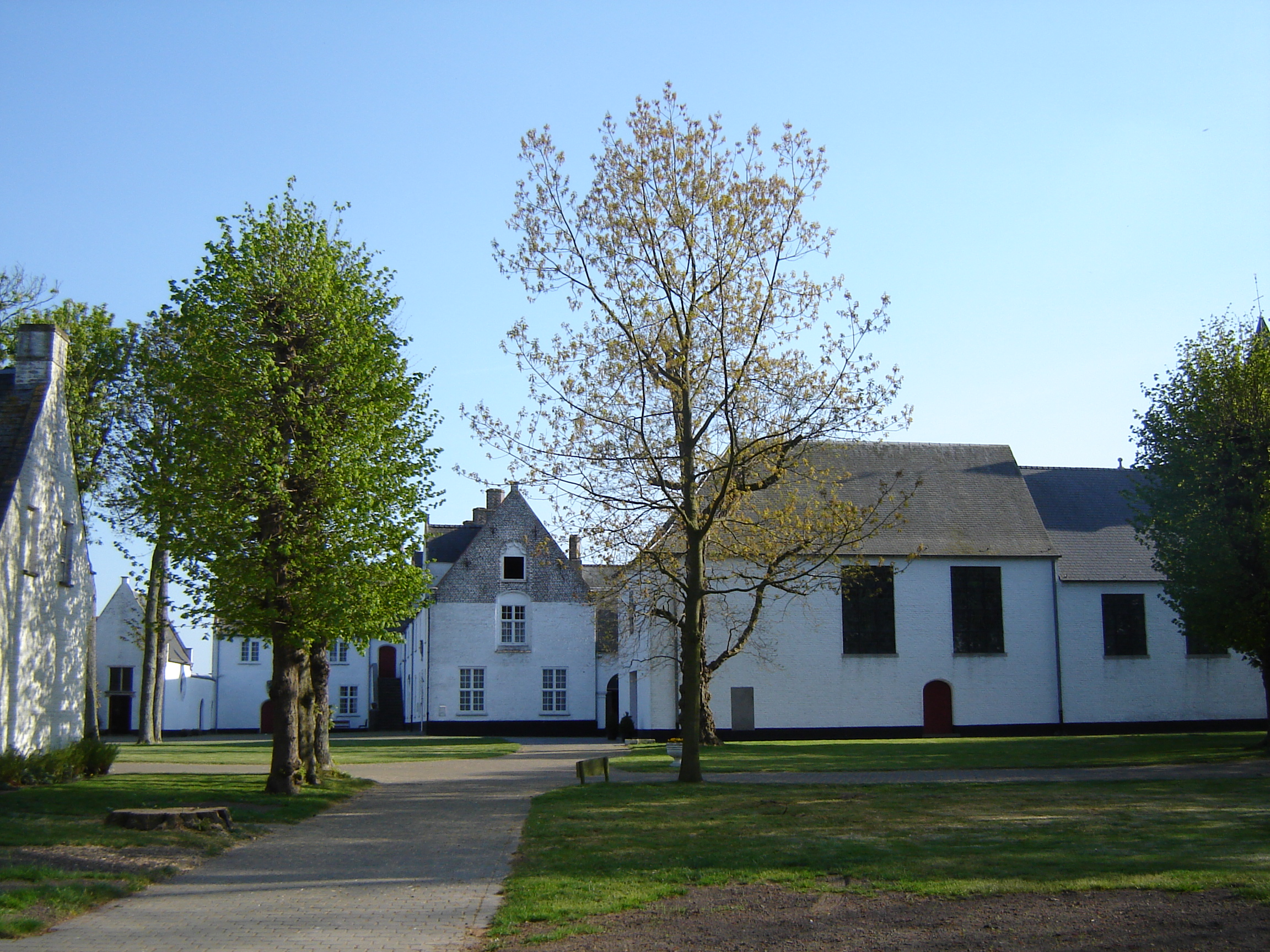 Abdij Ten Putte in Gistel Abdij Ten Putte, abbey in Gistel. Gistel, West Flanders, Belgium